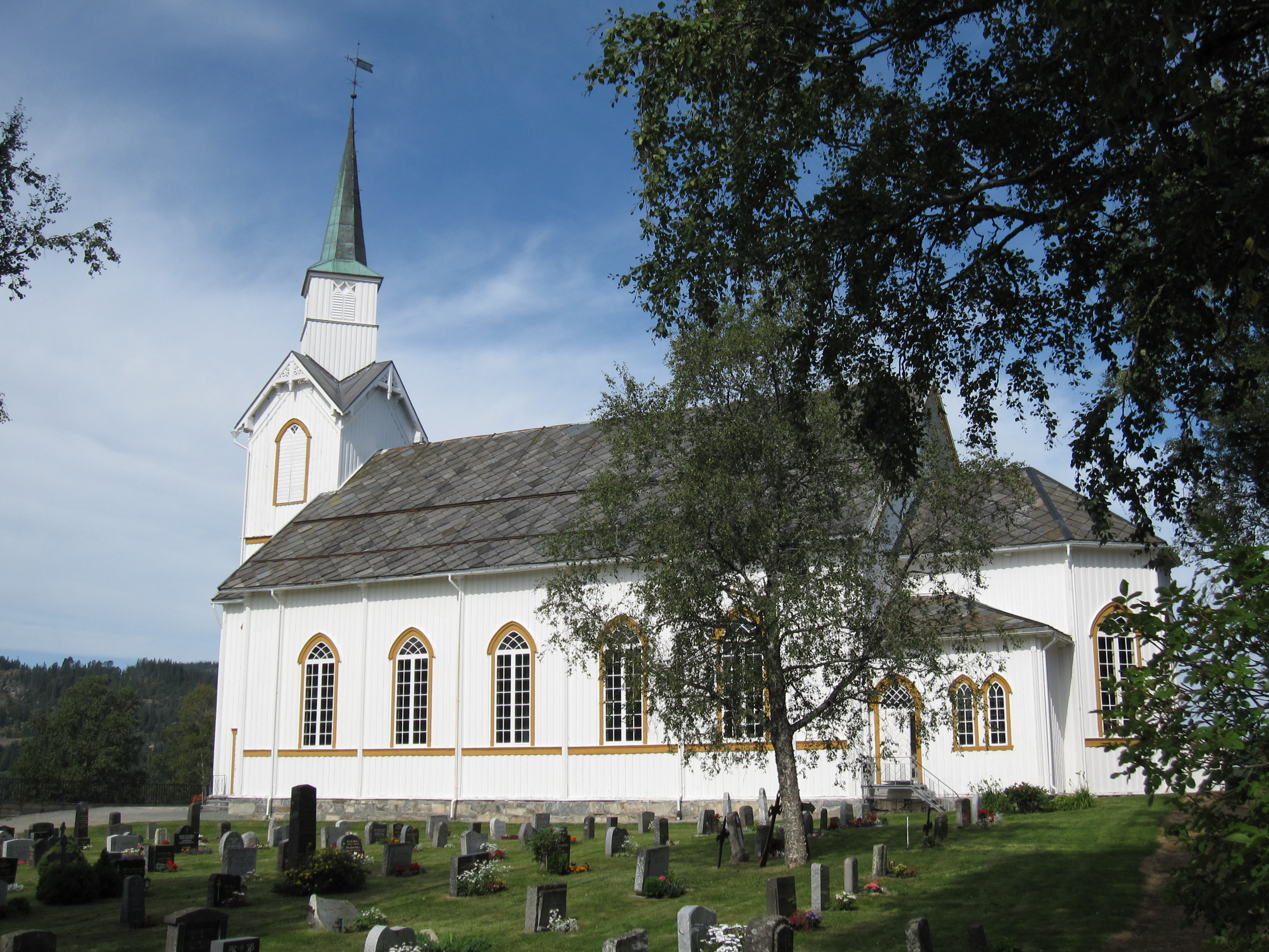 Beitstad kyrkje på Utvik i Steinkjer kommune i Nord-Trøndelag